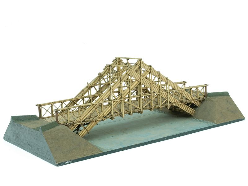 Huismodel. Model van een brug zoals hij bestaat op de rijweg tussen het dorp Centawa en Bojong Koneng, over de rivier Cimeuk (?) in West-Java.. Bamboe model van een brug